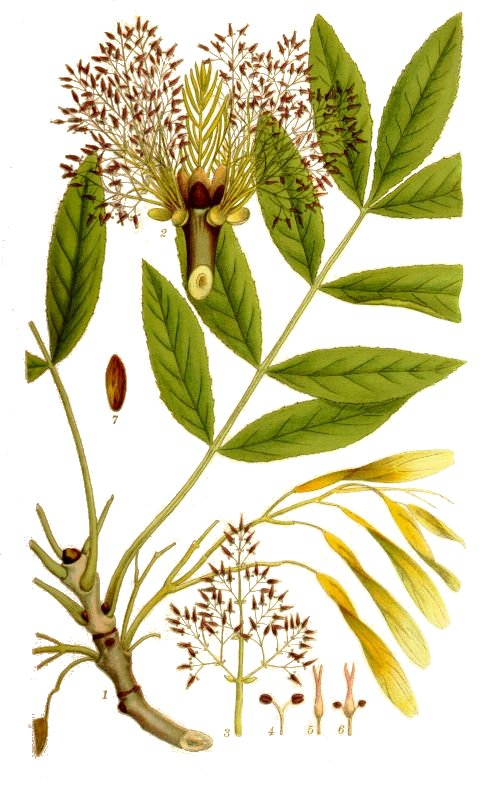 Ask (Fraxinus excelsior)